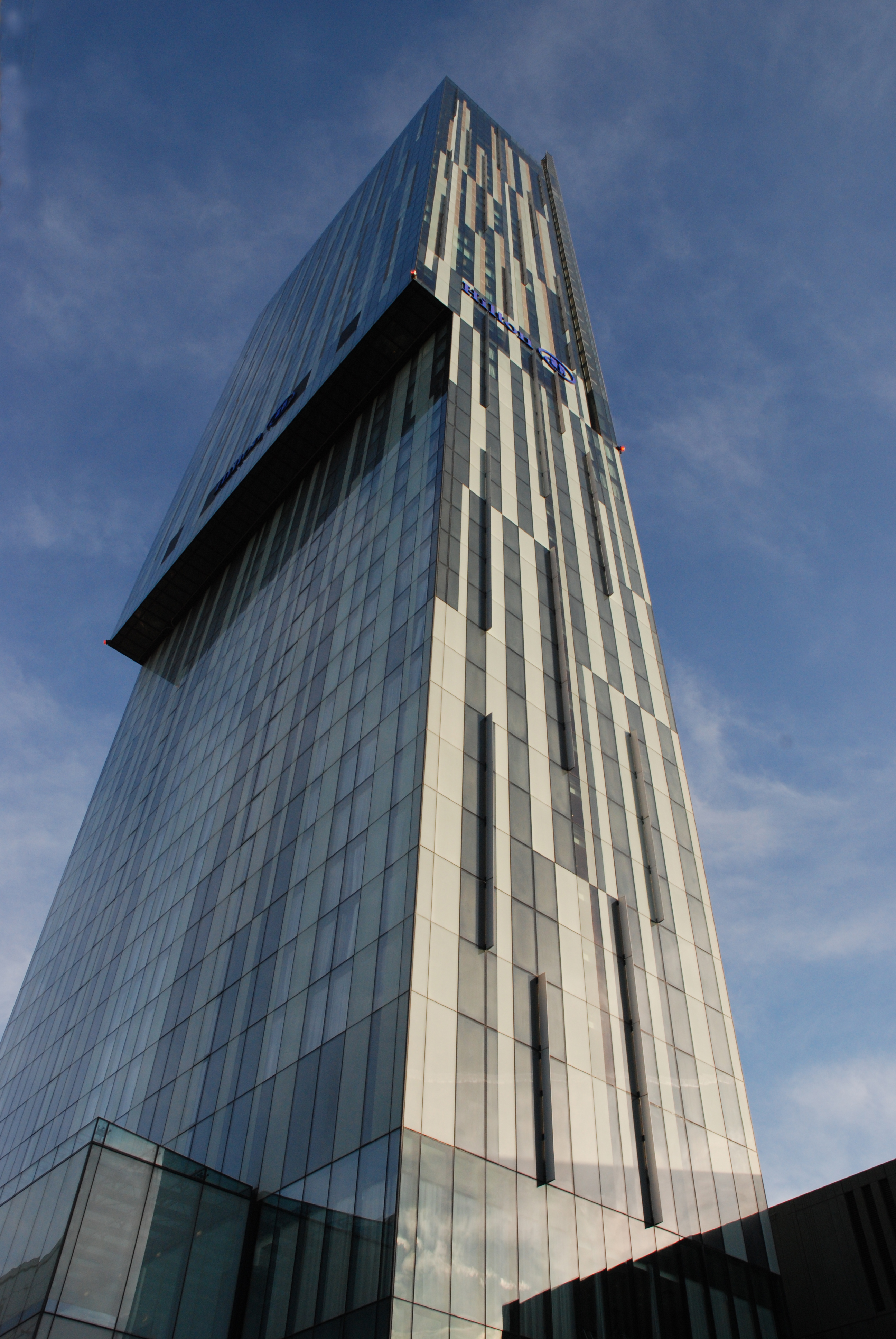 De Beetham Tower in Manchester, Engeland